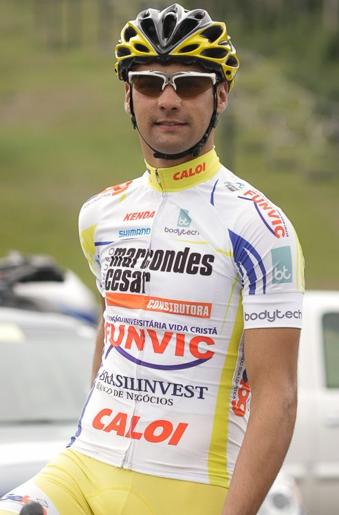 Ciclista uruguayo Ramiro Cabrera del equipo brasileño Funvic, en el Tour de Utah 2013